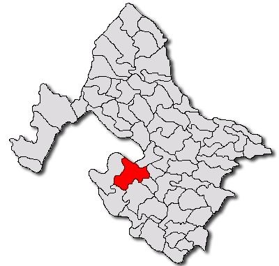 Categorie:Hărţi ale judeţului Mehedinţi